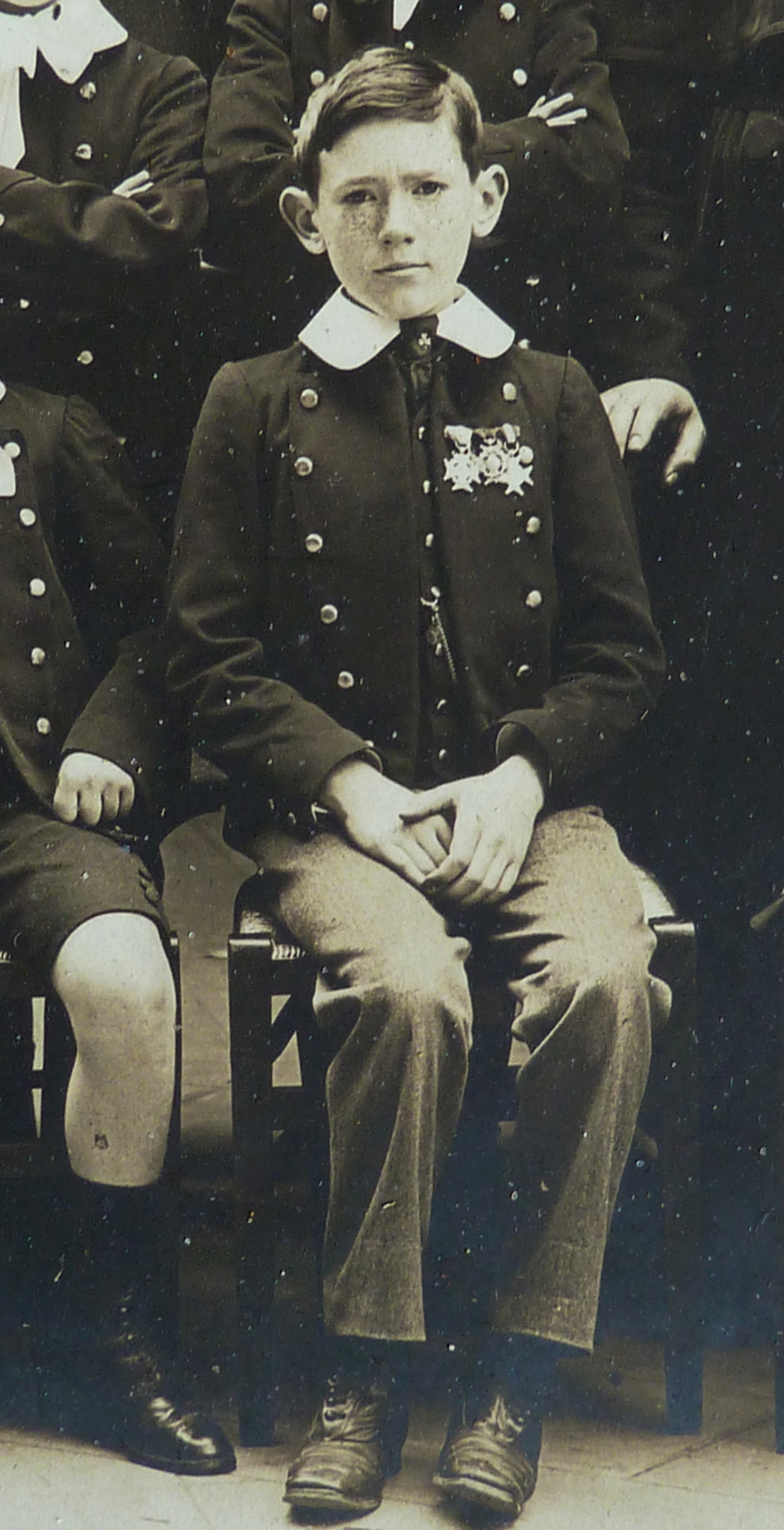 Un élève anonyme d'une classe de l'école jésuite ST Ignace de la rue de Madrid à Paris (8e arrond.), vers 1900, photographe non déterminé (peut-être De Johng frères). Collection privée